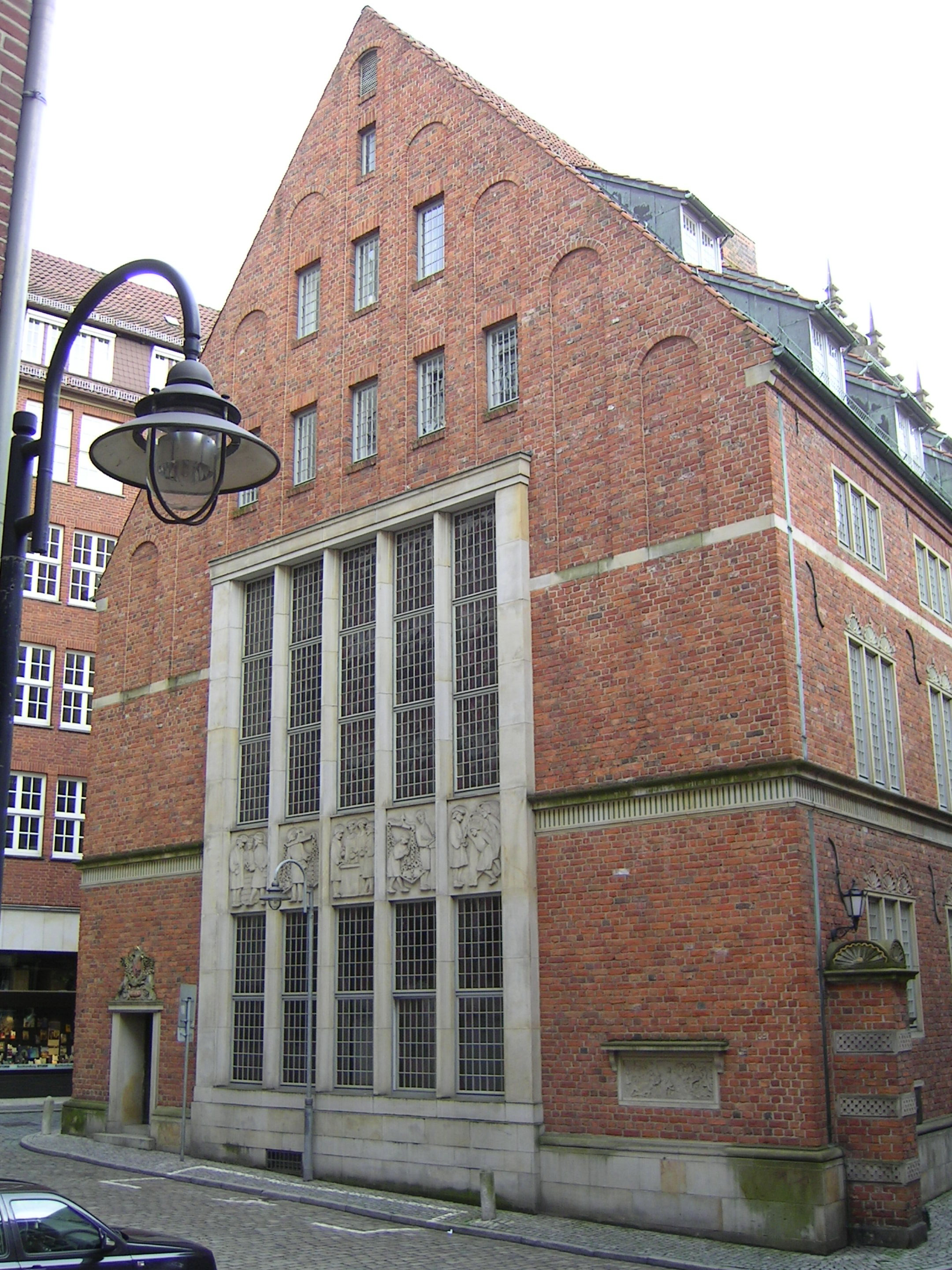 Built in 1586/88 by L. von Bentheim. Rebuilt again after WWII Address: Kulturhaus Stadtwaage - ein Gebäude der Sparkasse Bremen Langenstr. 13 28195 Bremen (Mitte) Germany Kulturhaus Stadtwaage Bremen - Info Plate 53°04′35.04″N 8°48′19.88″E / 53.0764°N 8.8055222°EUser:Tarawneh/rami